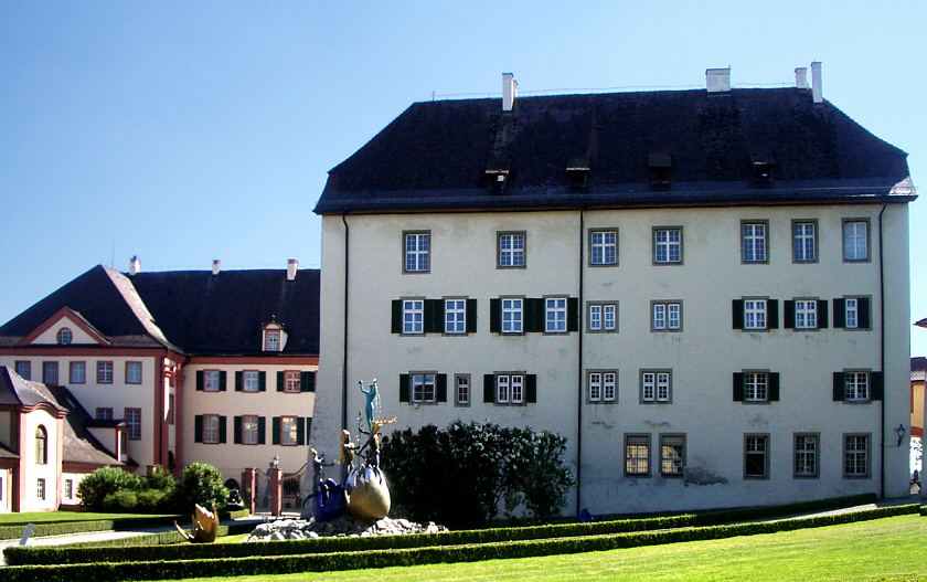 Altshausen, Germany: Schloss, links: Neues Schloss, rechts: Alter Bau